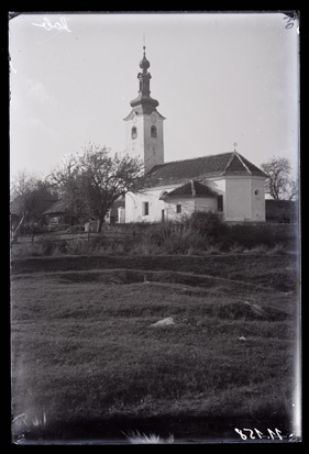 Cerkev sv. Petra v Dobu